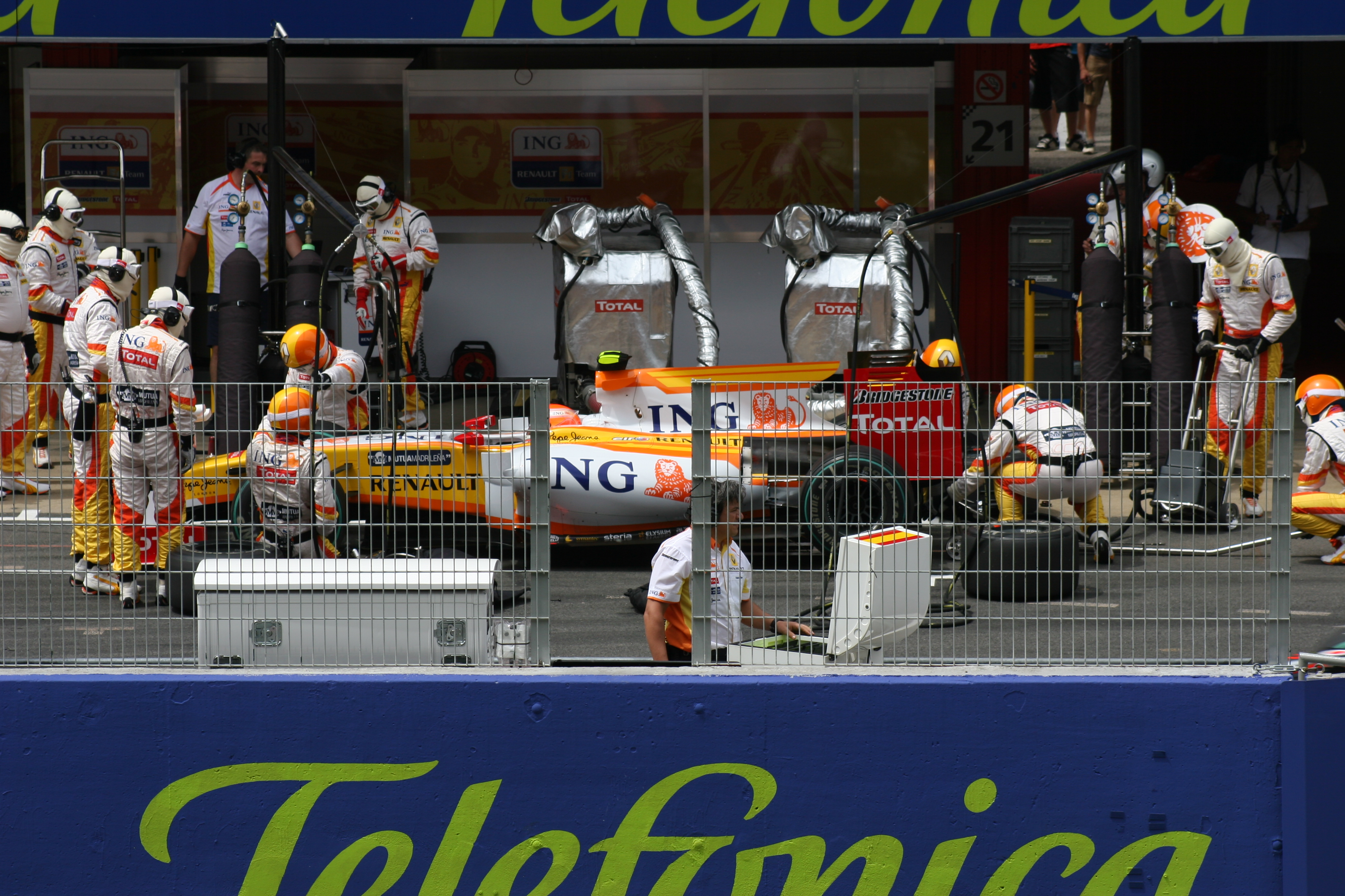 Renault.pitstop.Spain.09